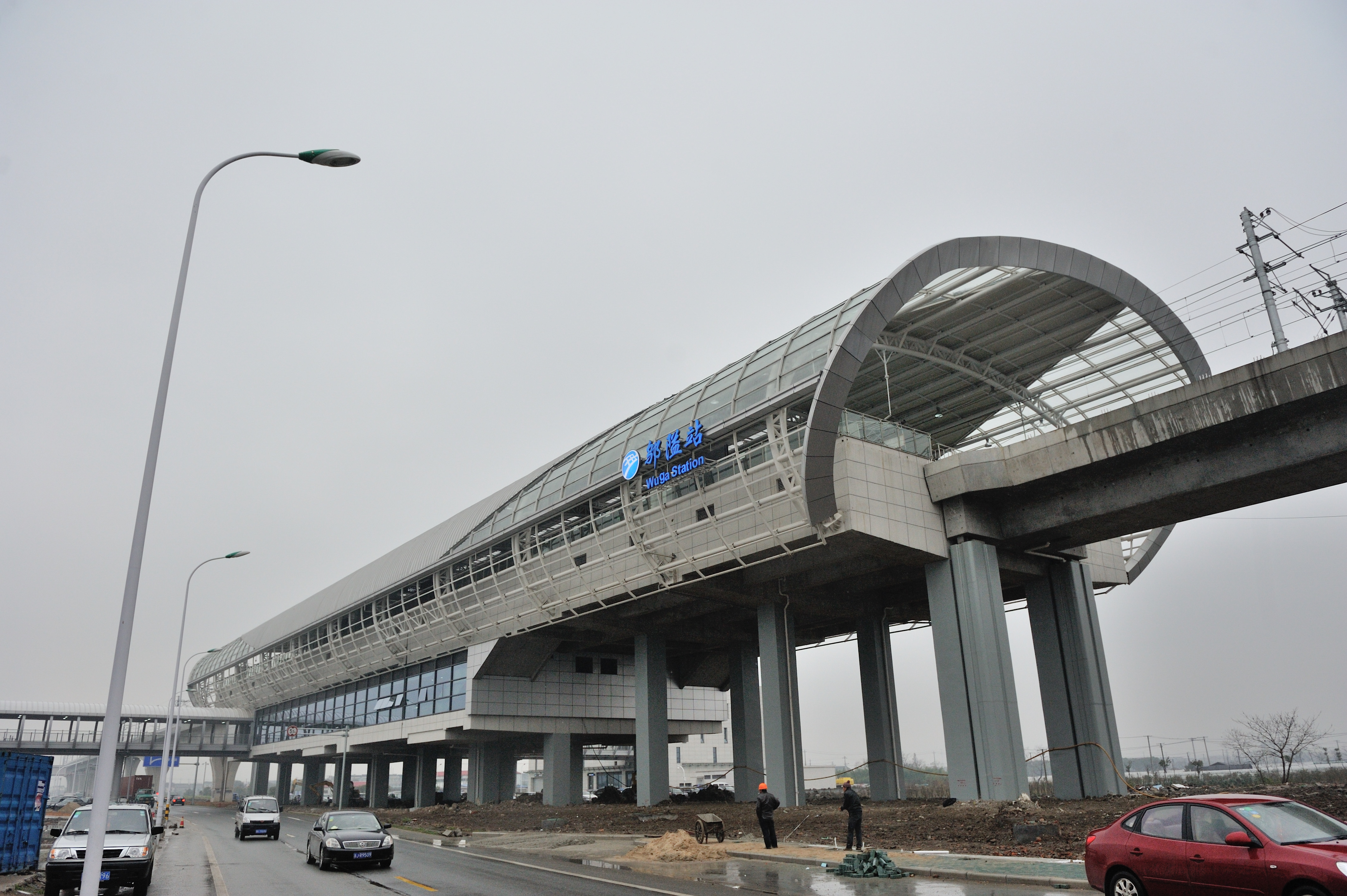 宁波轨道交通邬隘站